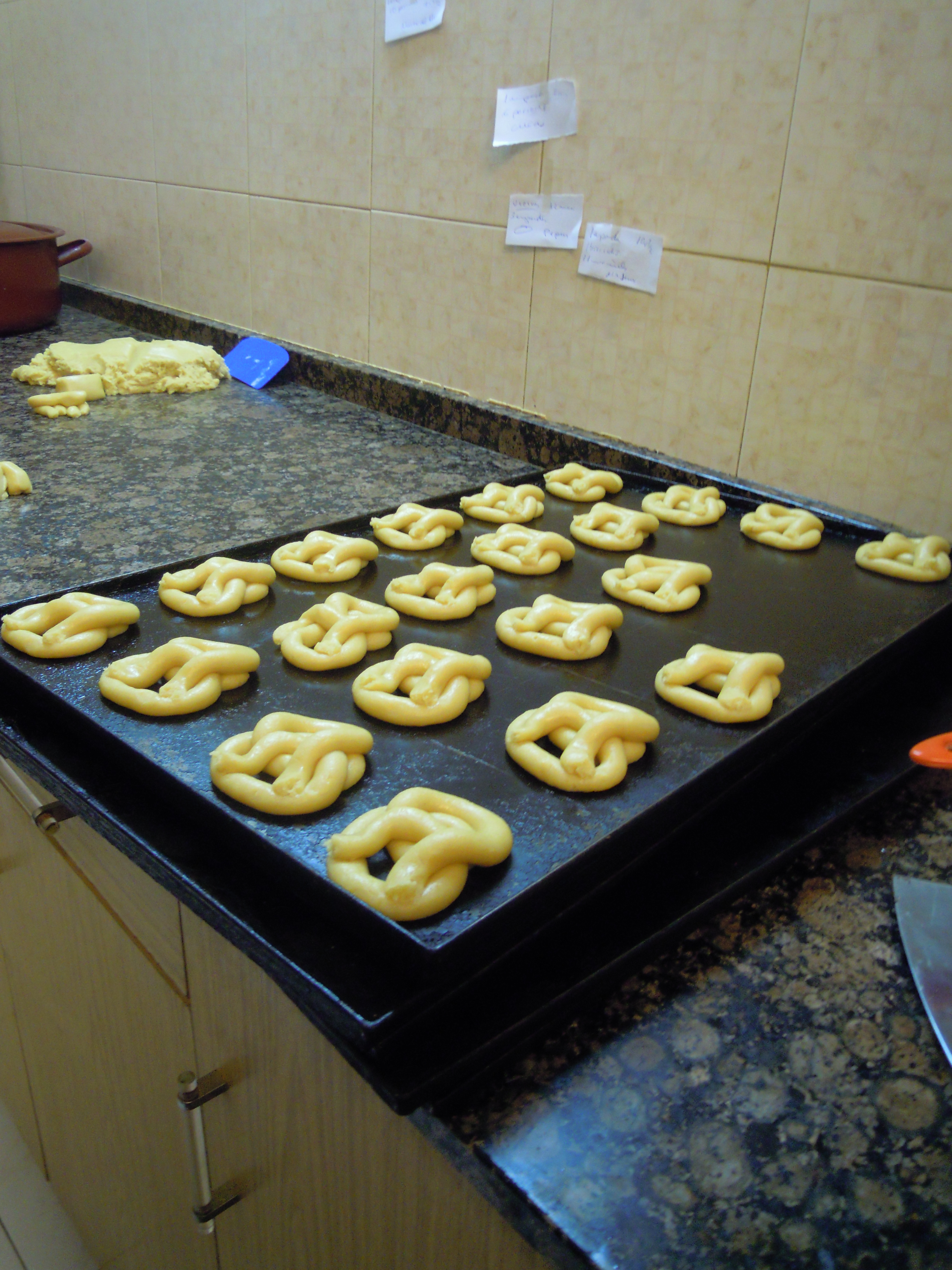 Marañueles